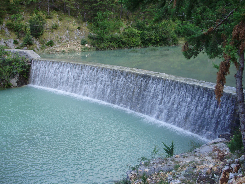 Mala mostina , Banjavice